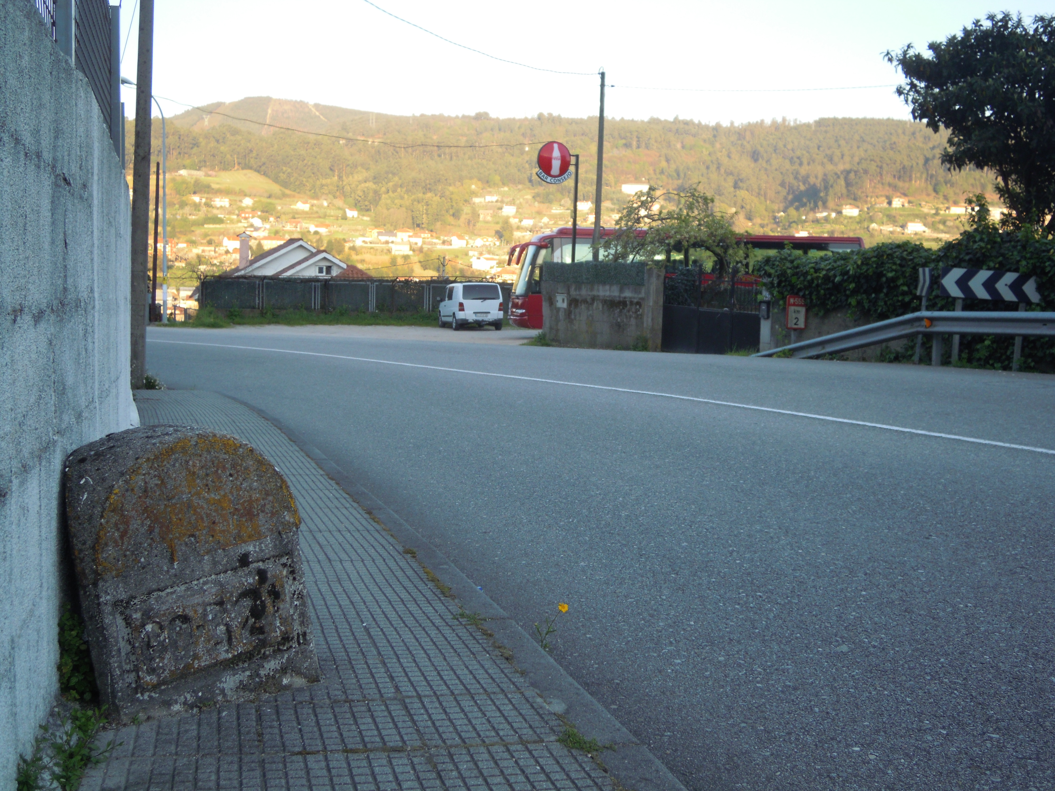 Fito quilométrico n° 2 da estrada PO-321 (actual N-555) ao seu paso por Pregal (Negros, Redondela)